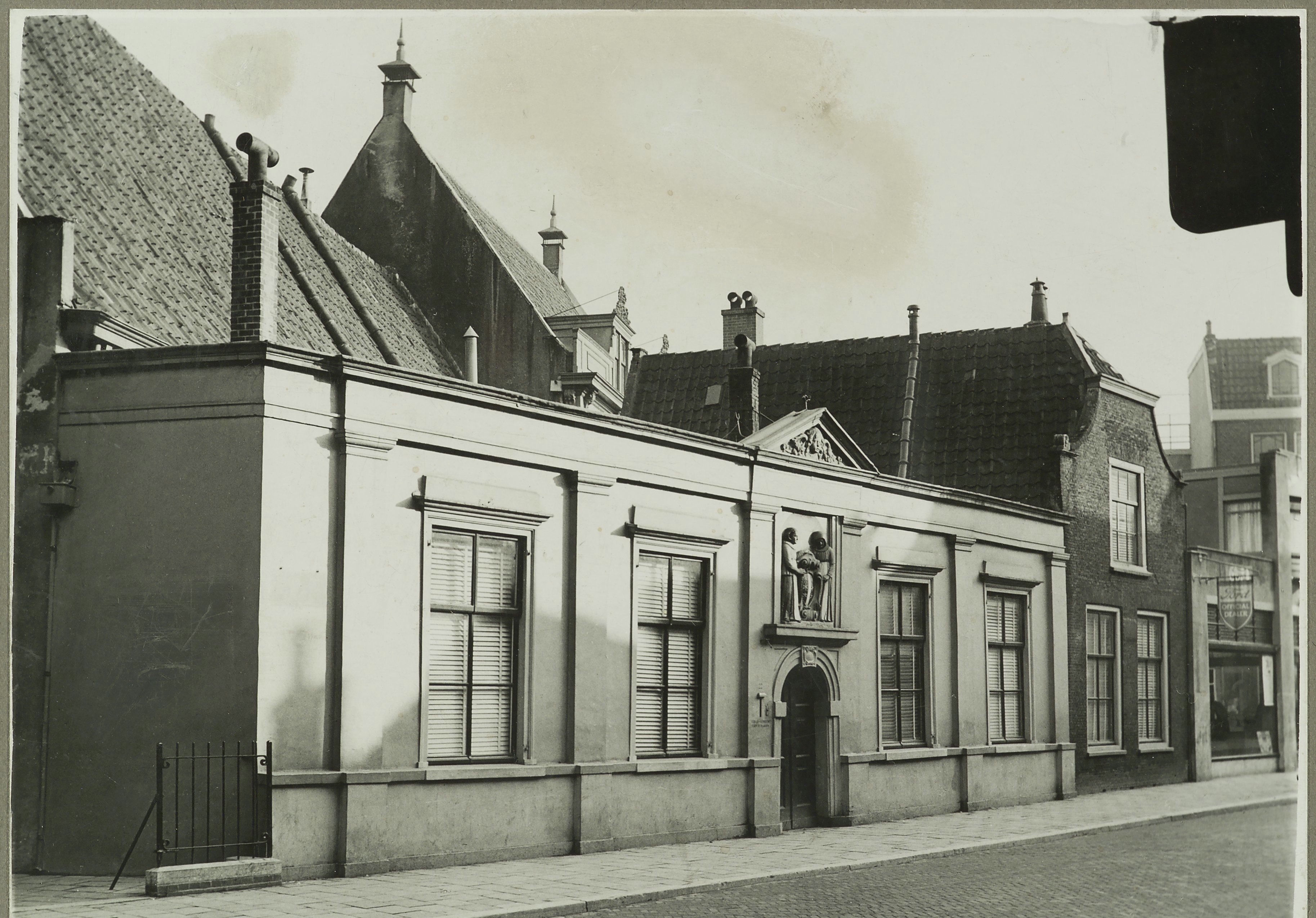 Elisabethgasthuis: Voorgevel gezien van links. Het gebouw is afgebroken. (opmerking: Zie ook neg 303.759 repro 1994)